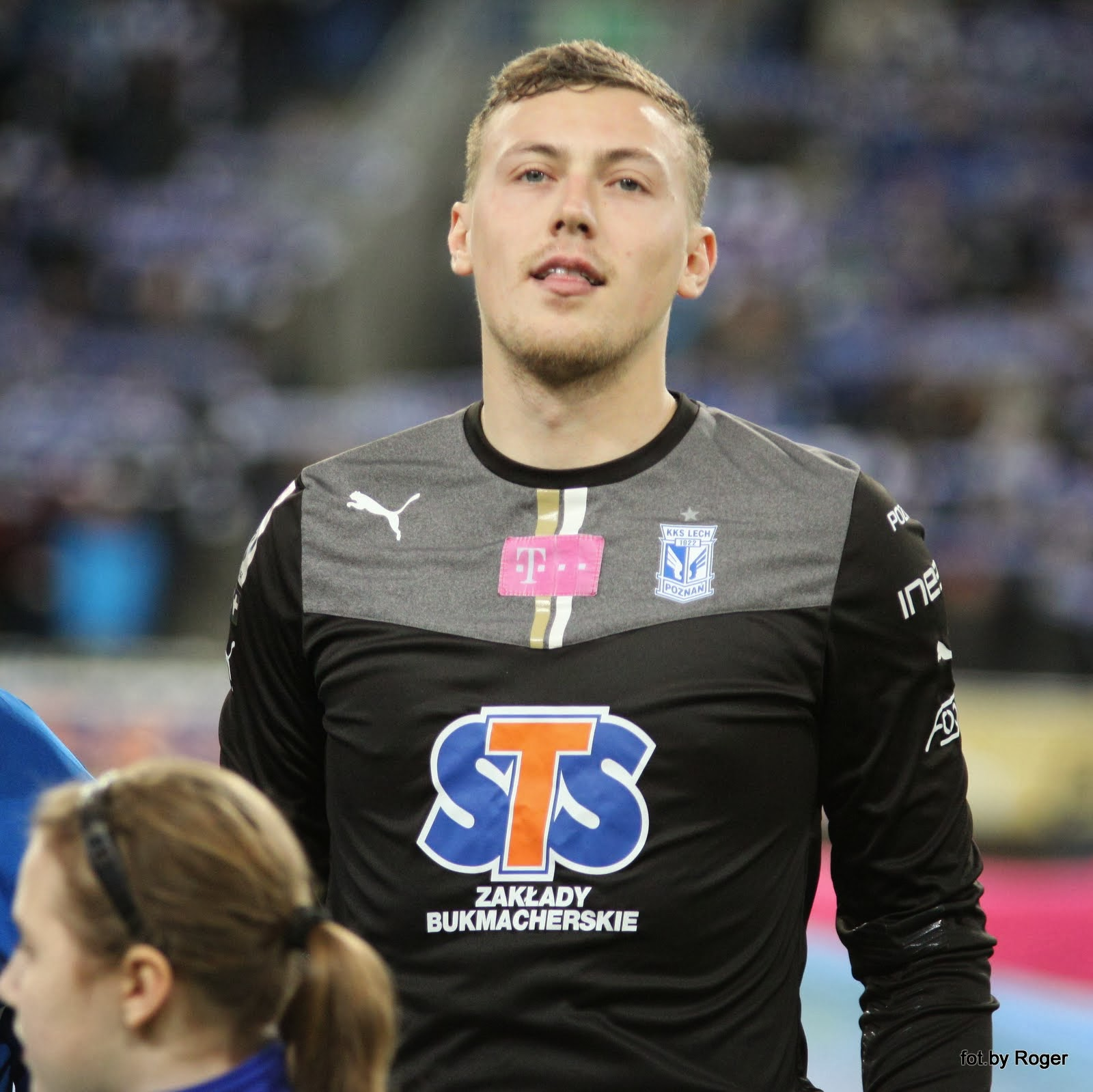 Maciej Gostomski, bramkarz.